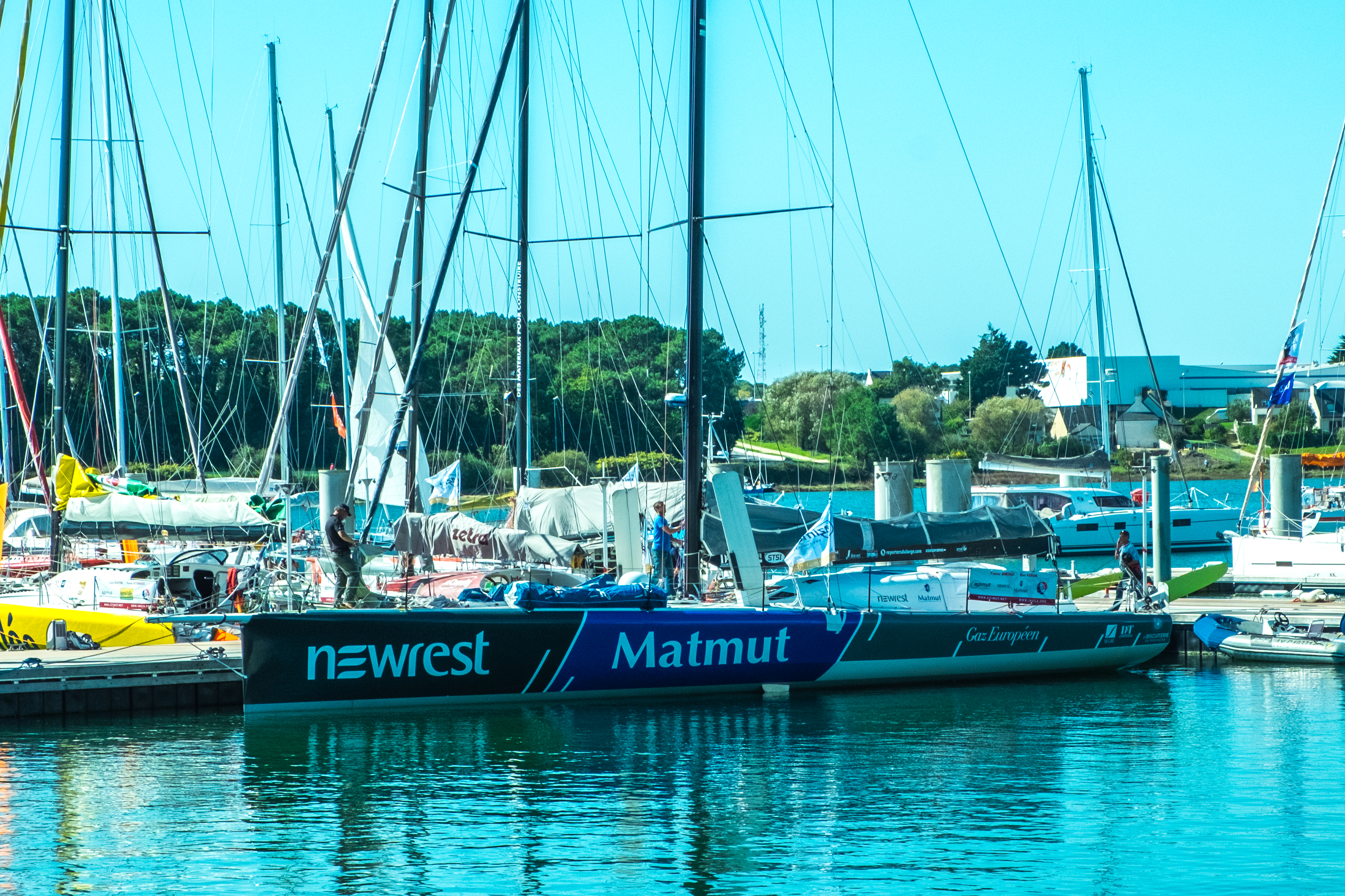 Le 60 pieds IMOCA Newsrest-Matmut, ex-Gitana Eighty, ex-Synerciel, en septembre 2015 à Lorient.